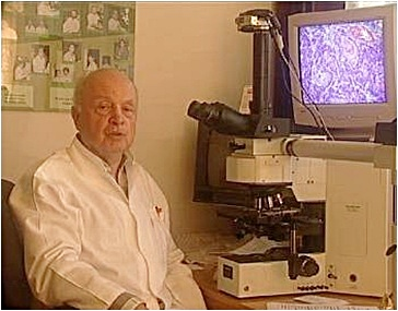 prof. Andrzej Kulig